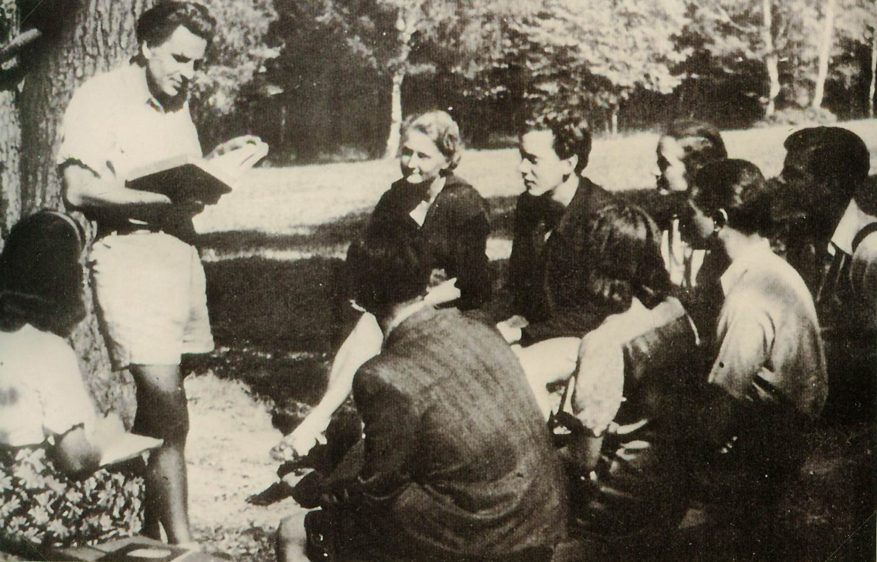 Otto Koenig mit Mitarbeitern und Studenten auf der Forschungsstation Wilhelminenberg, Wien, Österreich. Aufgenommen im Jahr 1948